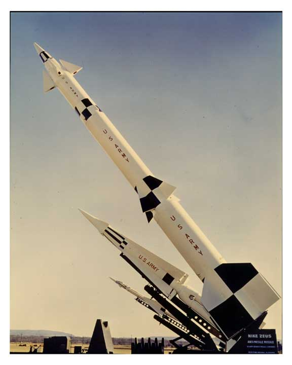 Nike family, From left, MIM-3 Nike-Ajax, MIM-14 Nike-Hercules, LIM-49 Nike-Zeus.